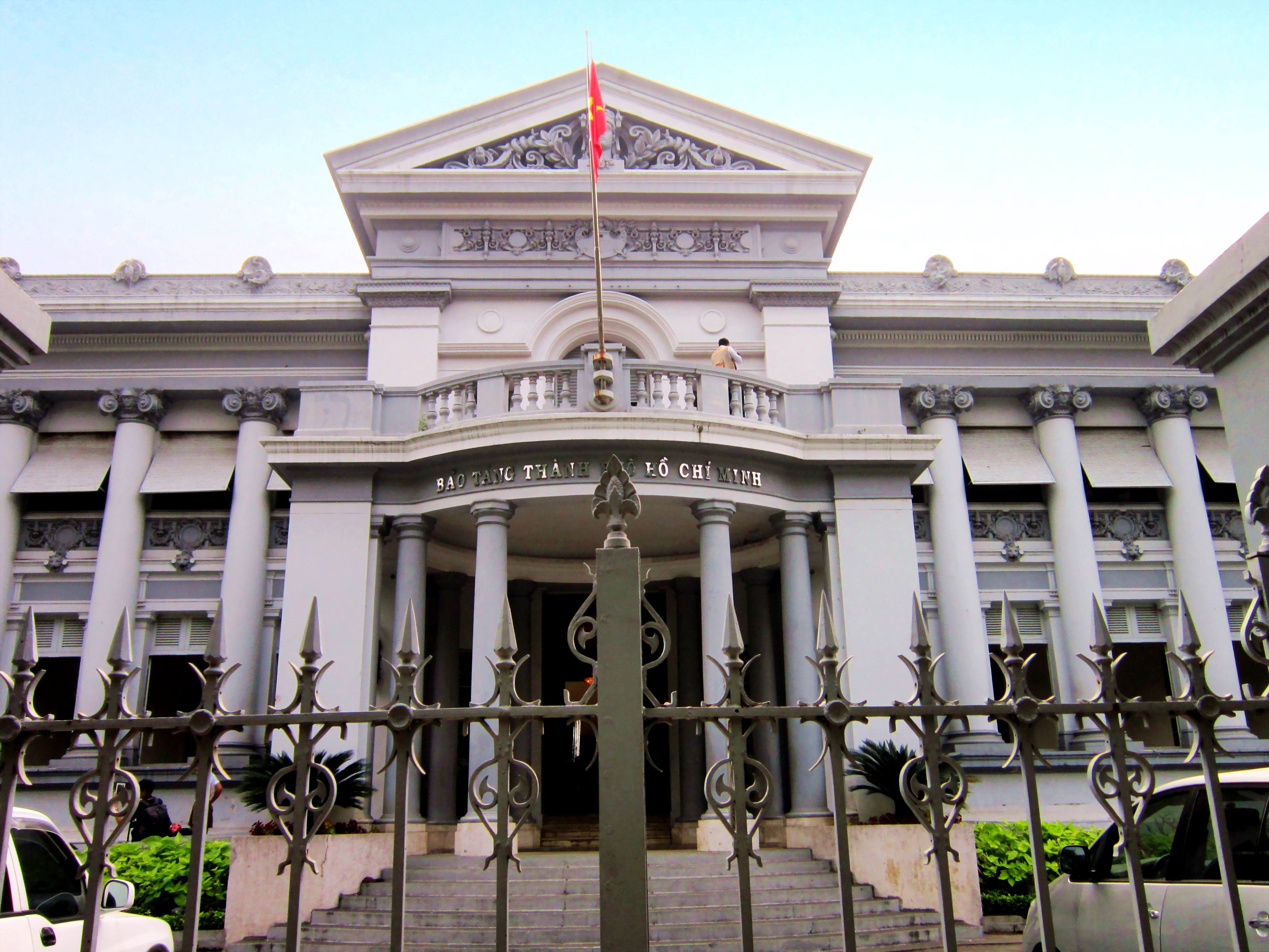 Bảo tàng Thành phố Hồ Chí Minh, Việt Nam.